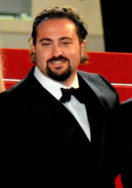 Jonathan Jakubowicz à la présentation de "Hands of Stone" au festival de Cannes